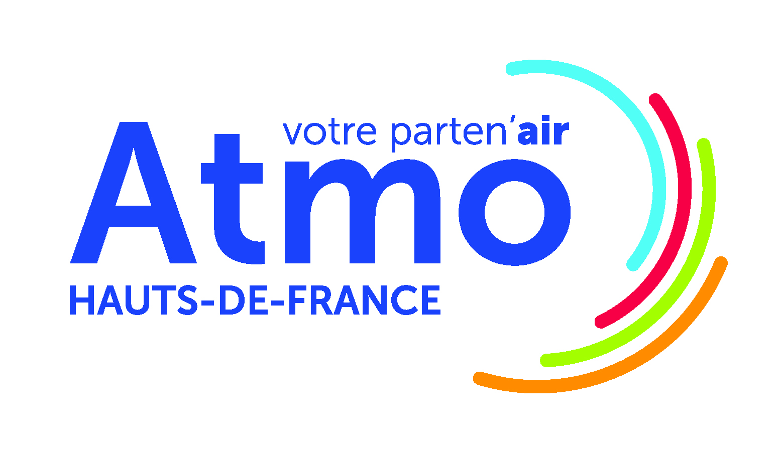 Logo de l'observatoire de l'air : Atmo Hauts de France